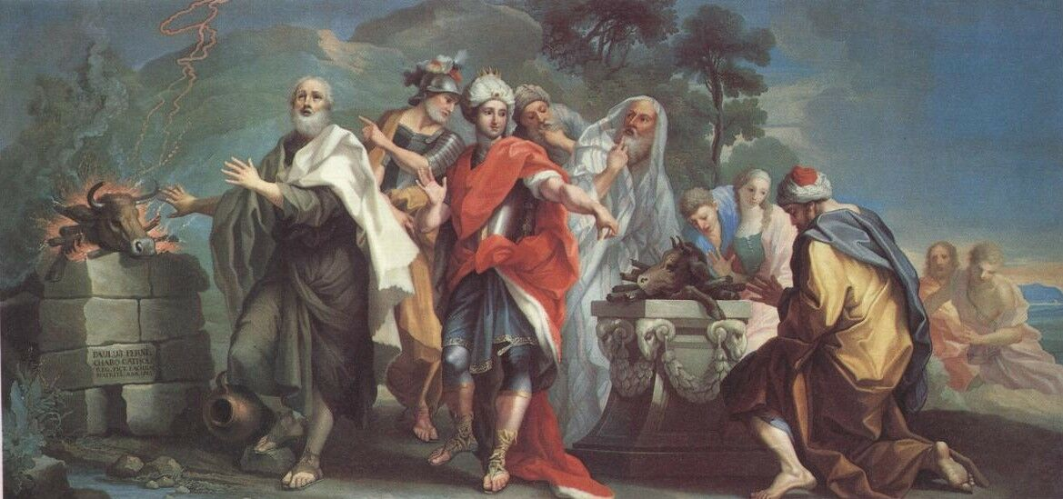 La obra representa al profeta hebreo Elías haciendo un sacrificio a Dios.